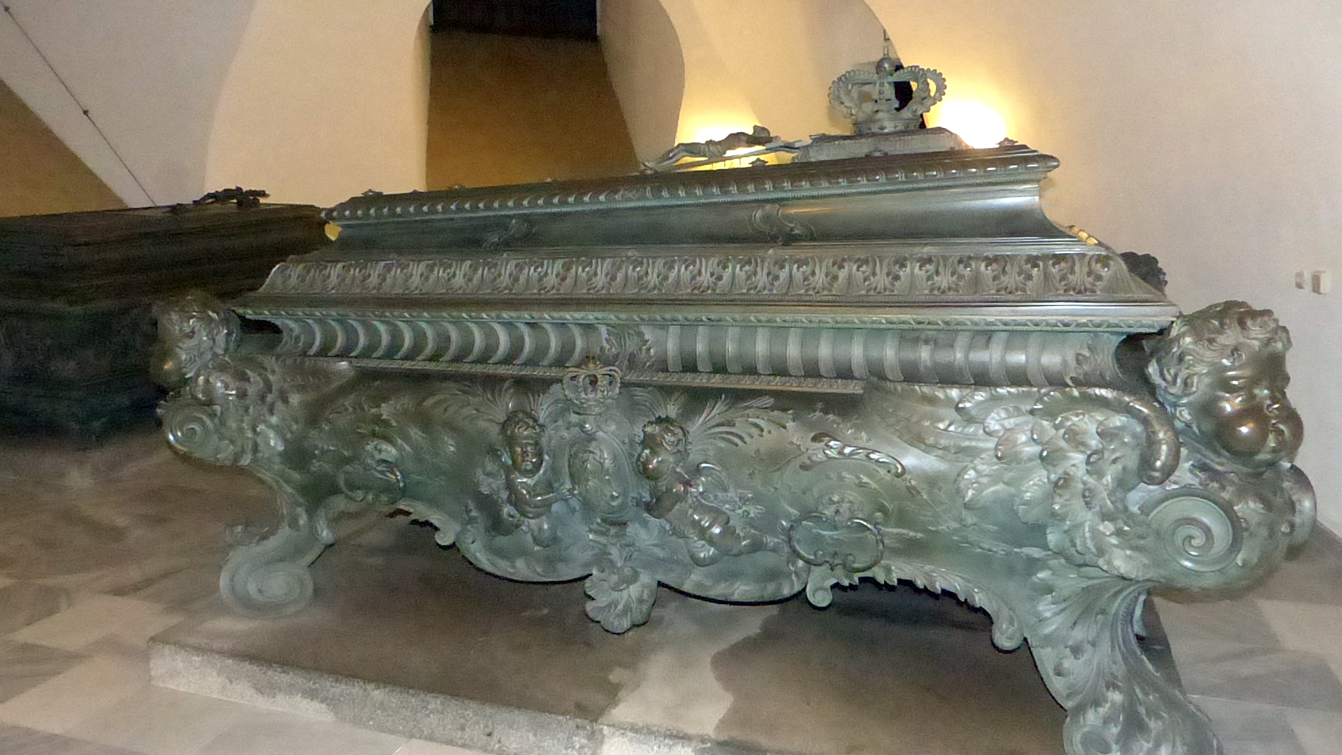 Sargophag von Johann von Sachsen in der Königsgruft in der Wettiner Gruft der Katholischen Hofkirche in Dresden